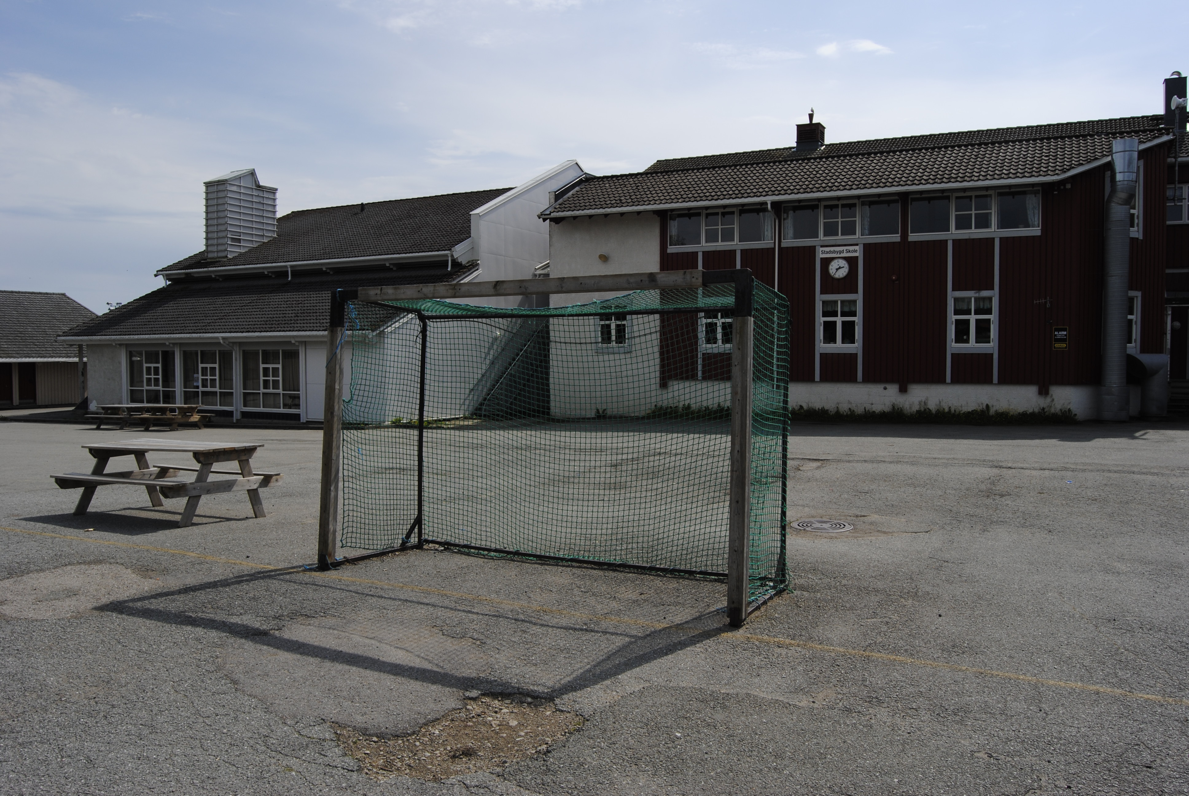 Stadsbygd skole i Rissa, juli 2015.